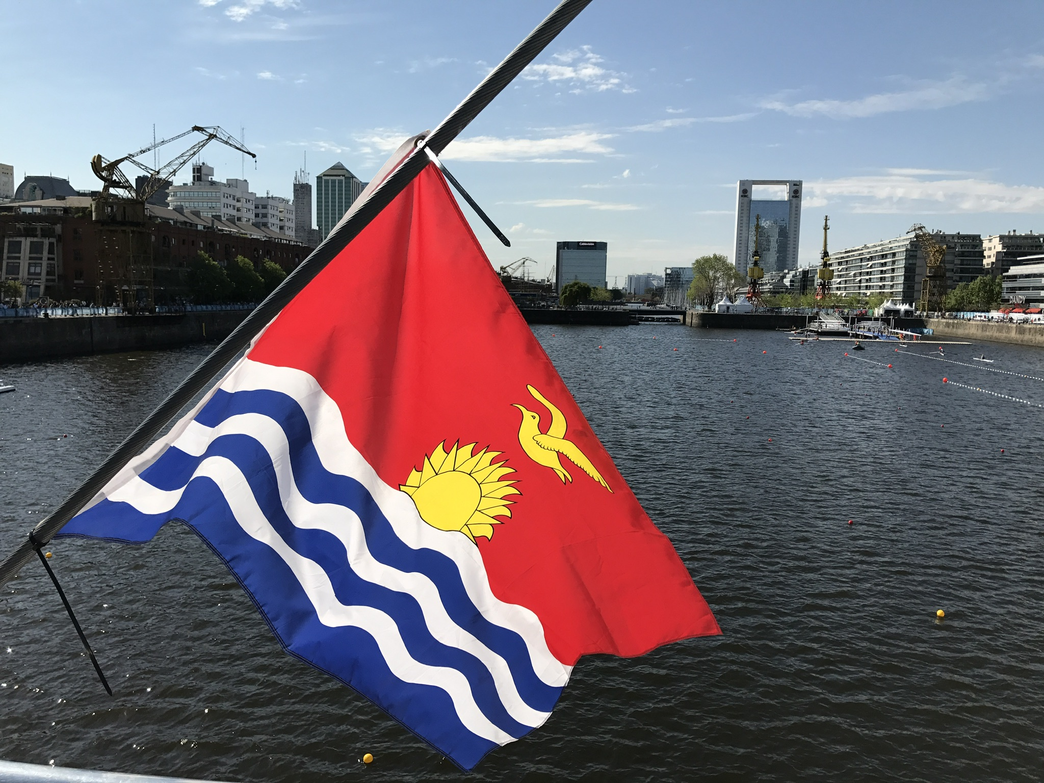 Le 9 octobre 2018, peu avant les épreuves d’aviron, sur l’œuvre de Santiago Calatrava